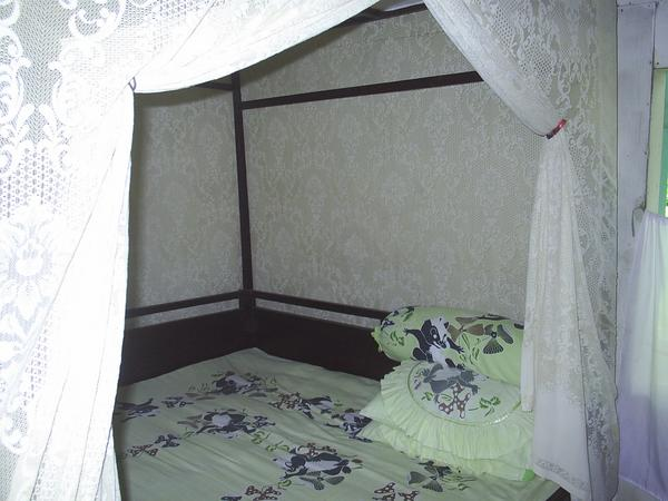 Soekarno's bedroom in Rengasdengklok